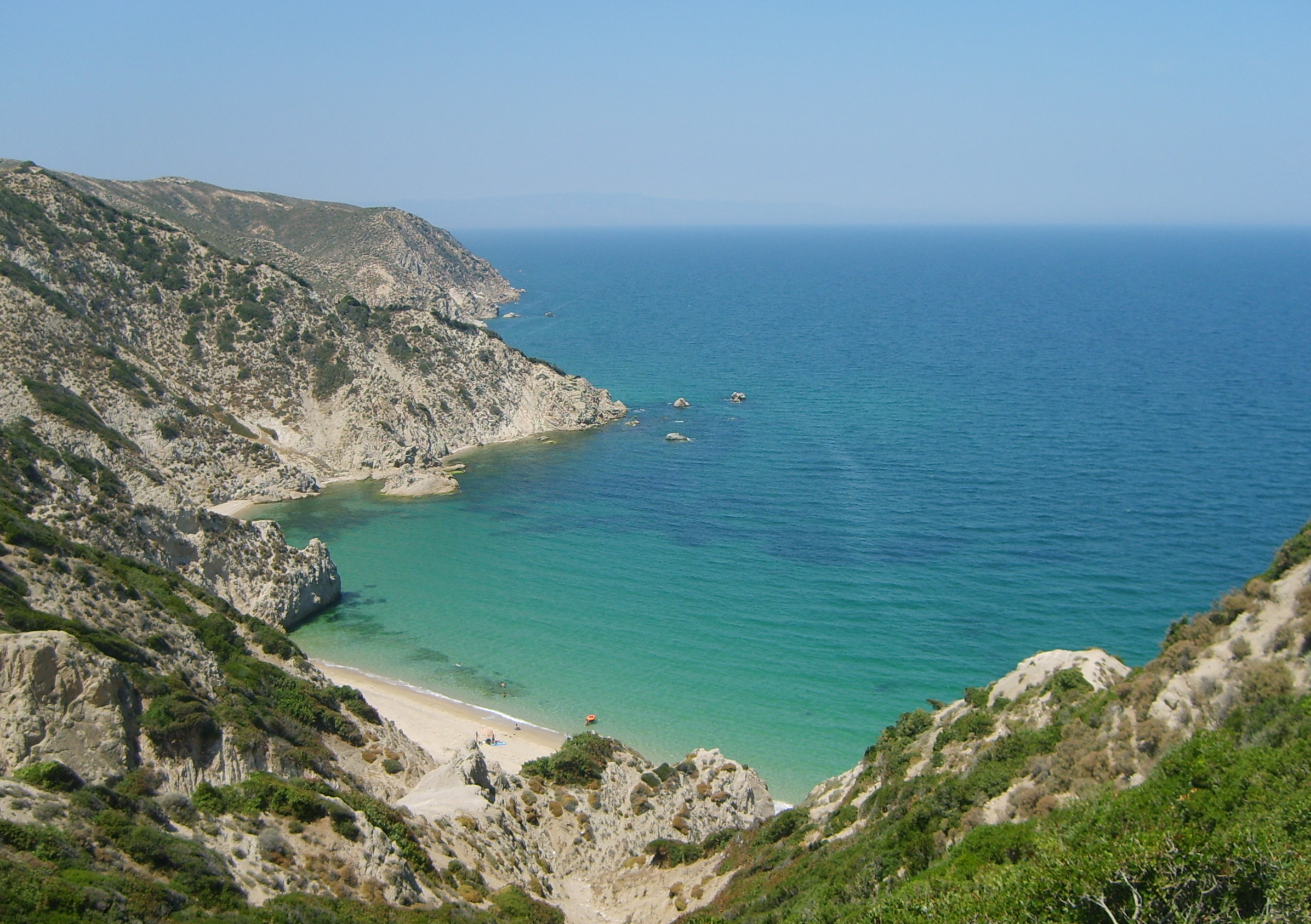 Karabiga, Biga, Çanakkale